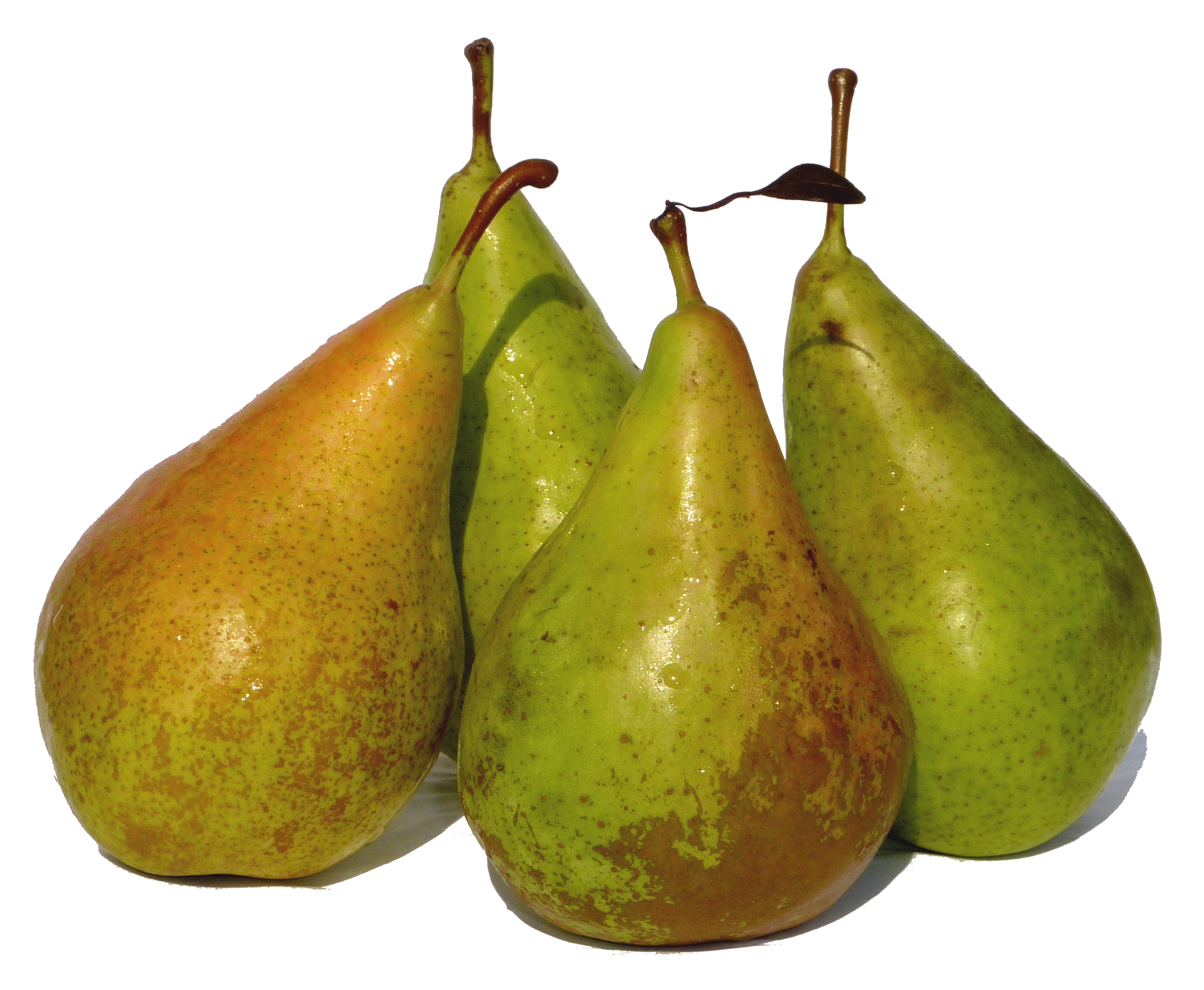 Poires Conférences